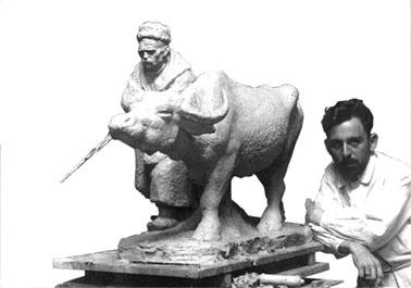 Иван Ла́заров (1889—1952) — болгарский скульптор